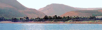 Madgdala zone: le rivage - Nazag